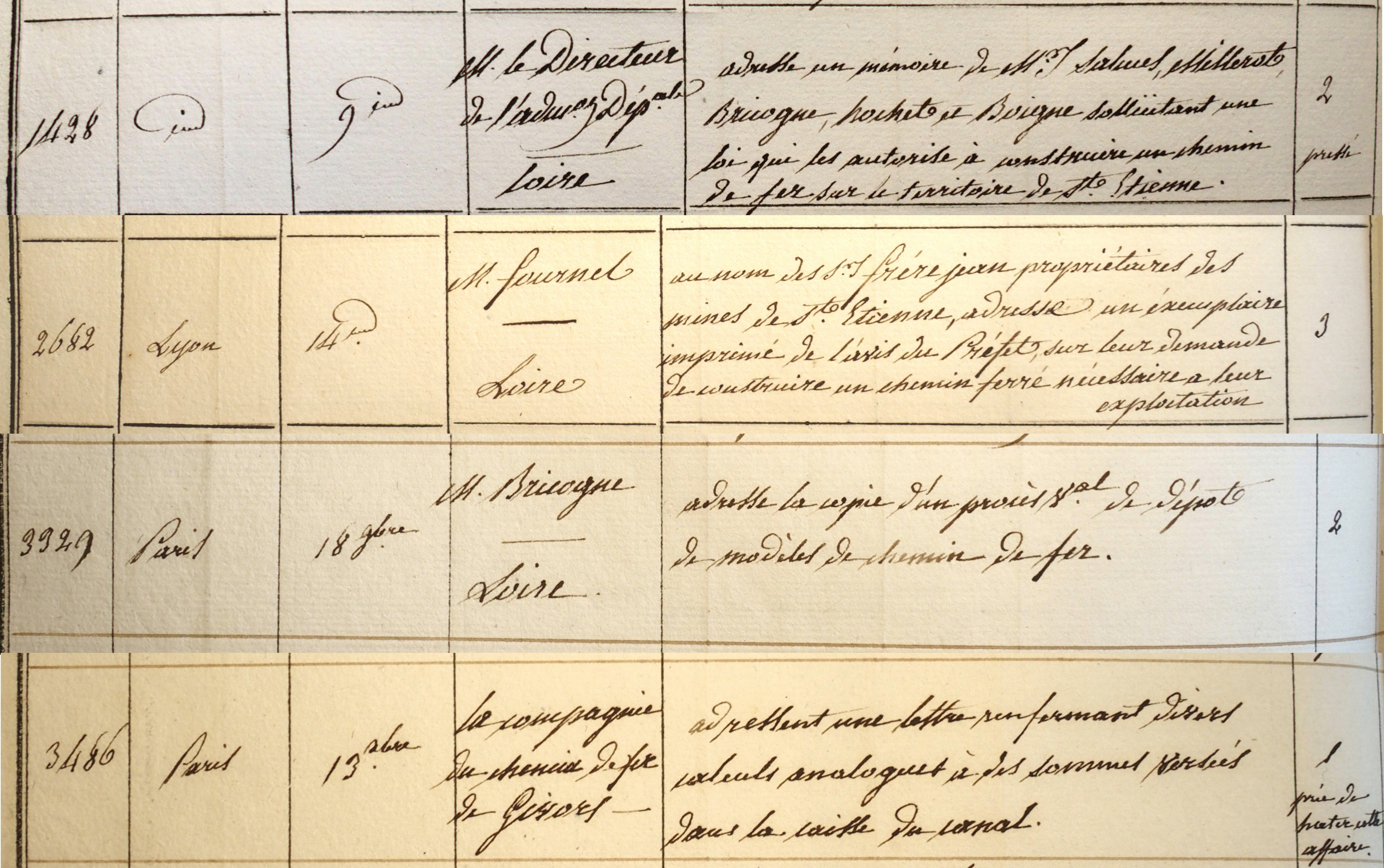 Divers enregistrements de courrier en 1821 relatifs aux chemin de fer de Saint-cyrienne à la Loire.